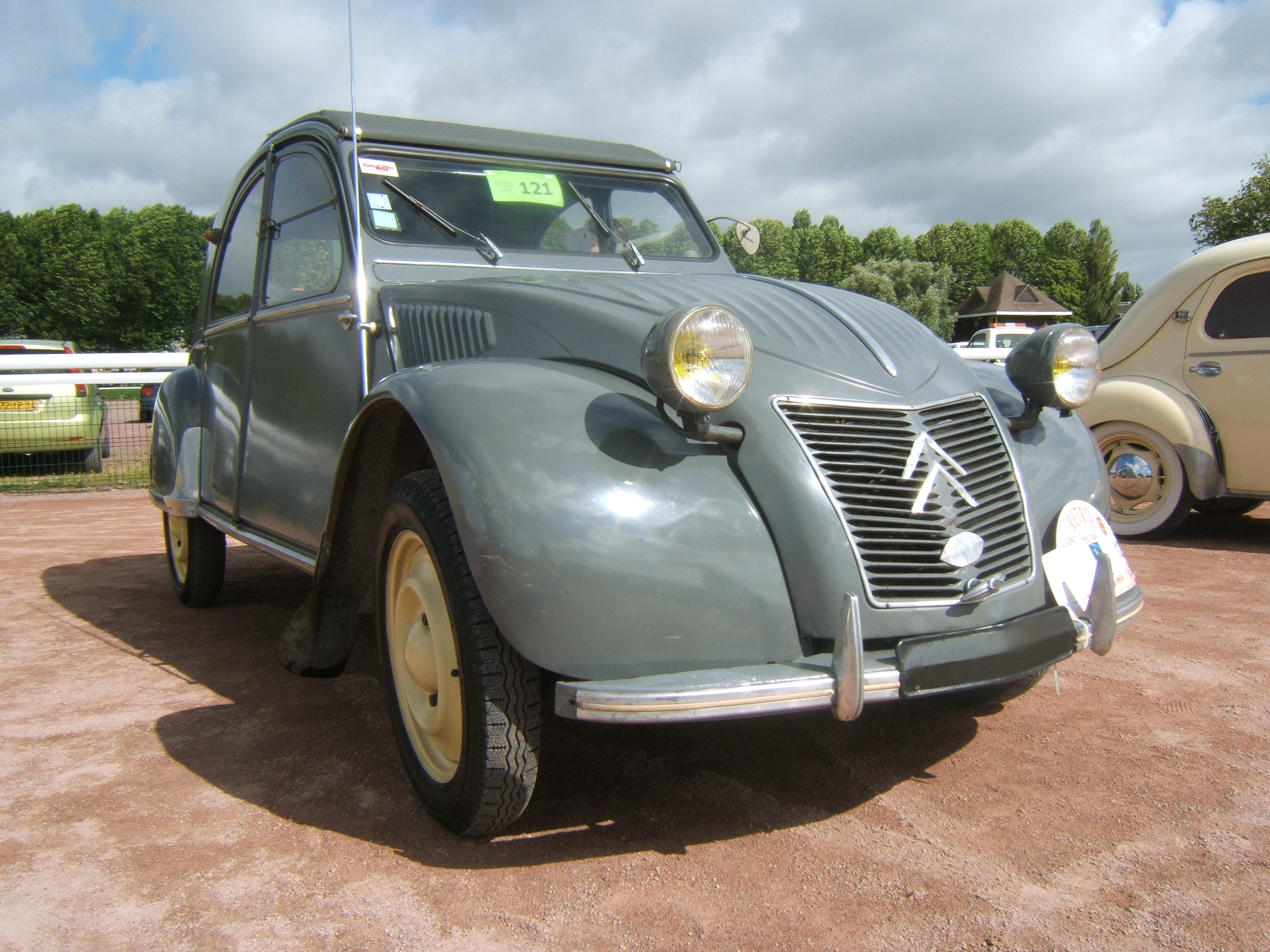 2CV de 1956 sur l'hippodrome de Caen lors du 1er Rétro Auto Festival de 2007.